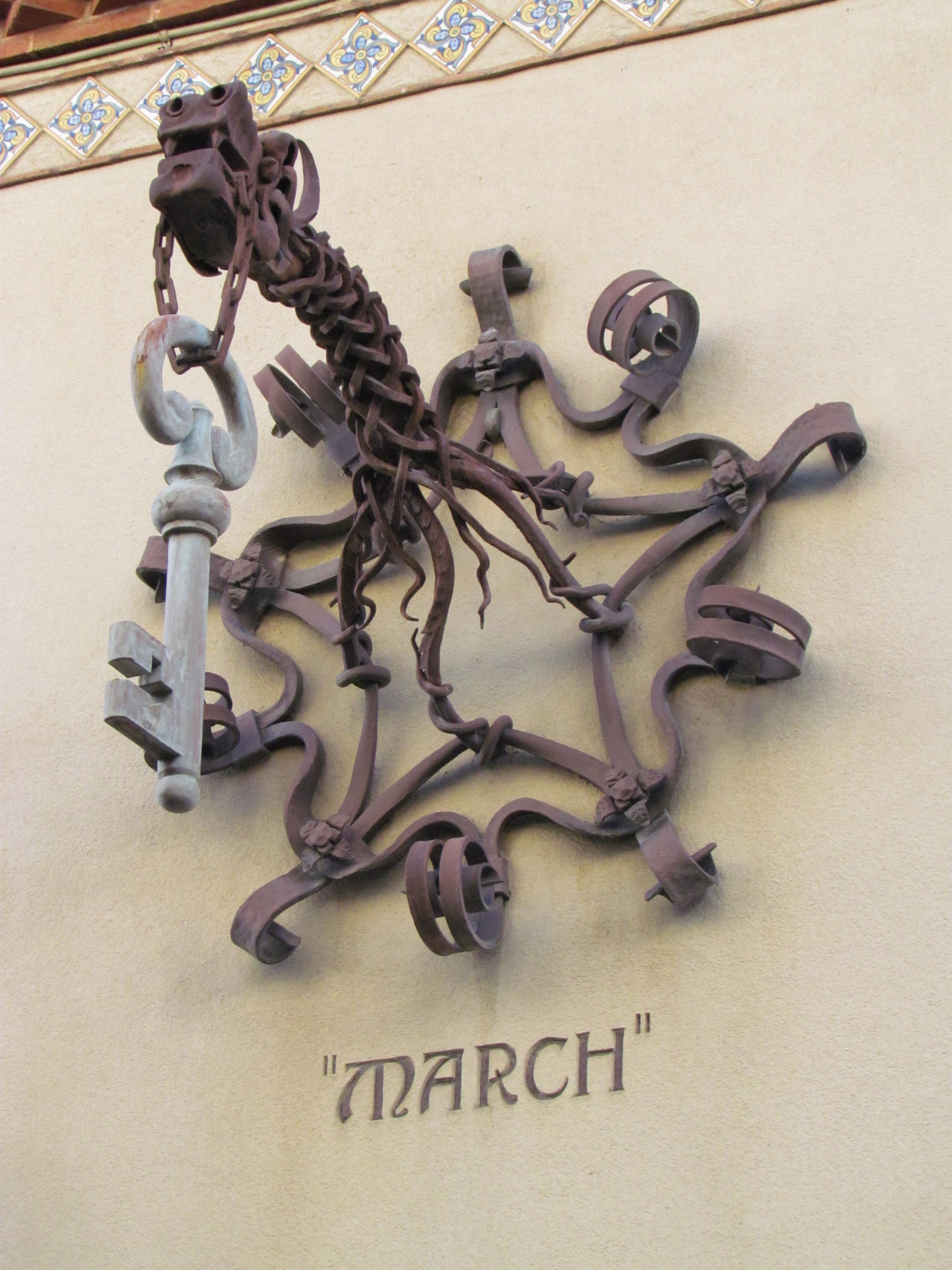 Vista del Drac de Ferro Forjat. (Mataró, el Maresme)